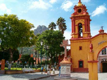 Bernal, Querétaro, MX, met in de achtergrond de monoliet.. zelf gemaakt M. Michiels juli 2004